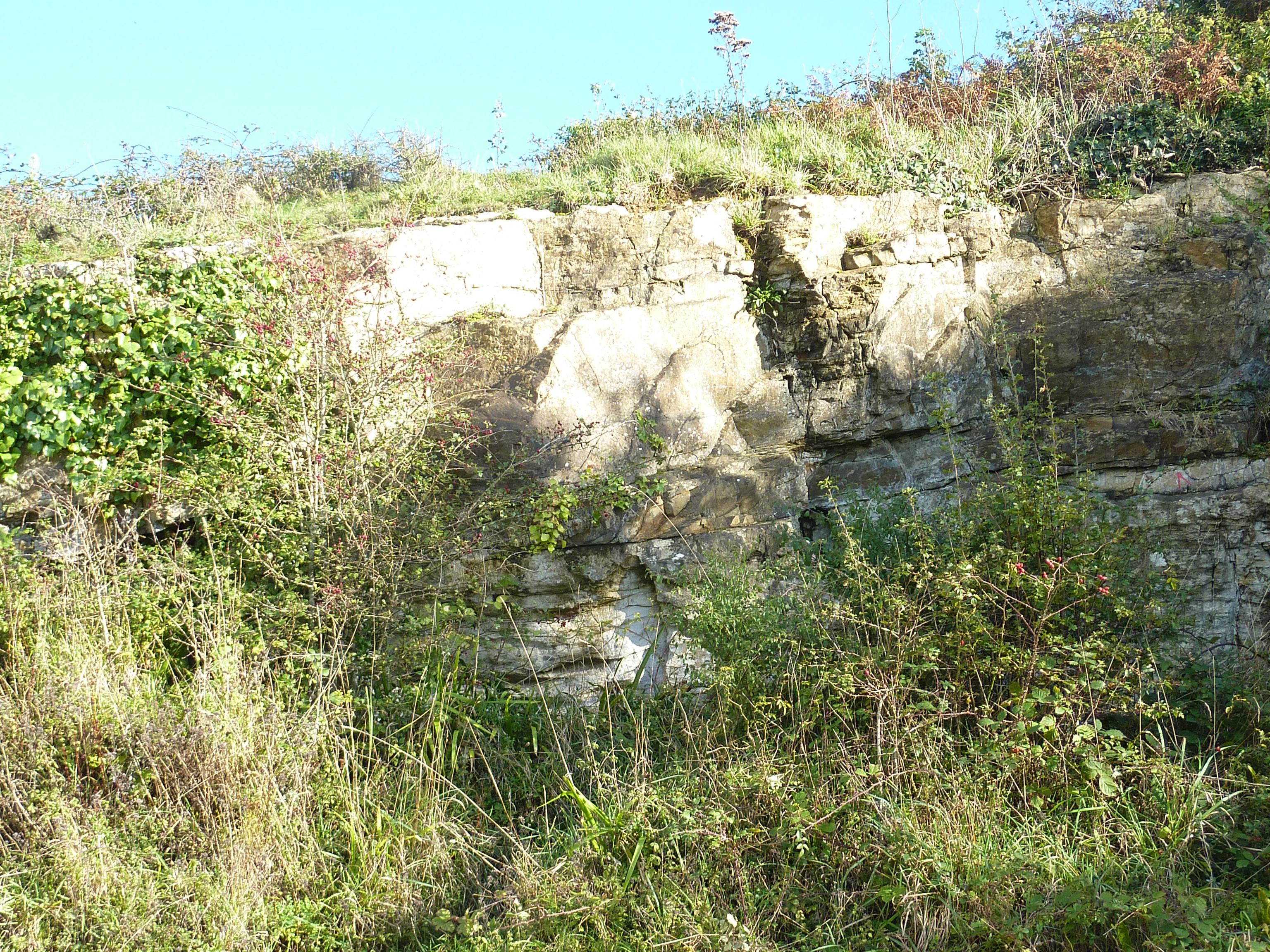 Crozon : le gisement de calcaire de Rozan, sur la rive gauche de l'Aber (qui a permis la construction du Four-à-chaux de Rozan)